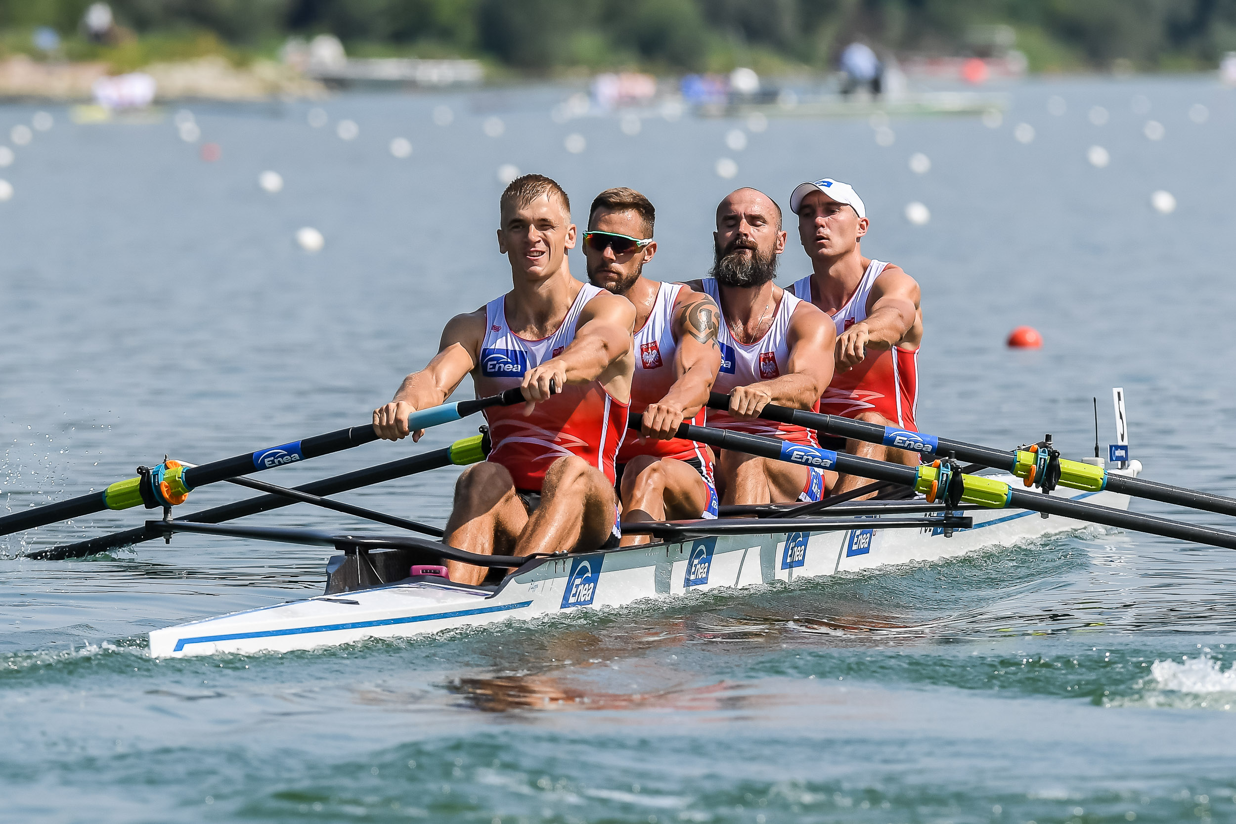 Polska czwórka bez sternika mężczyzn, mistrzowie świata 2019: Michał Szpakowski, Marcin Brzeziński, Mikołaj Burda, Mateusz Wilangowski.